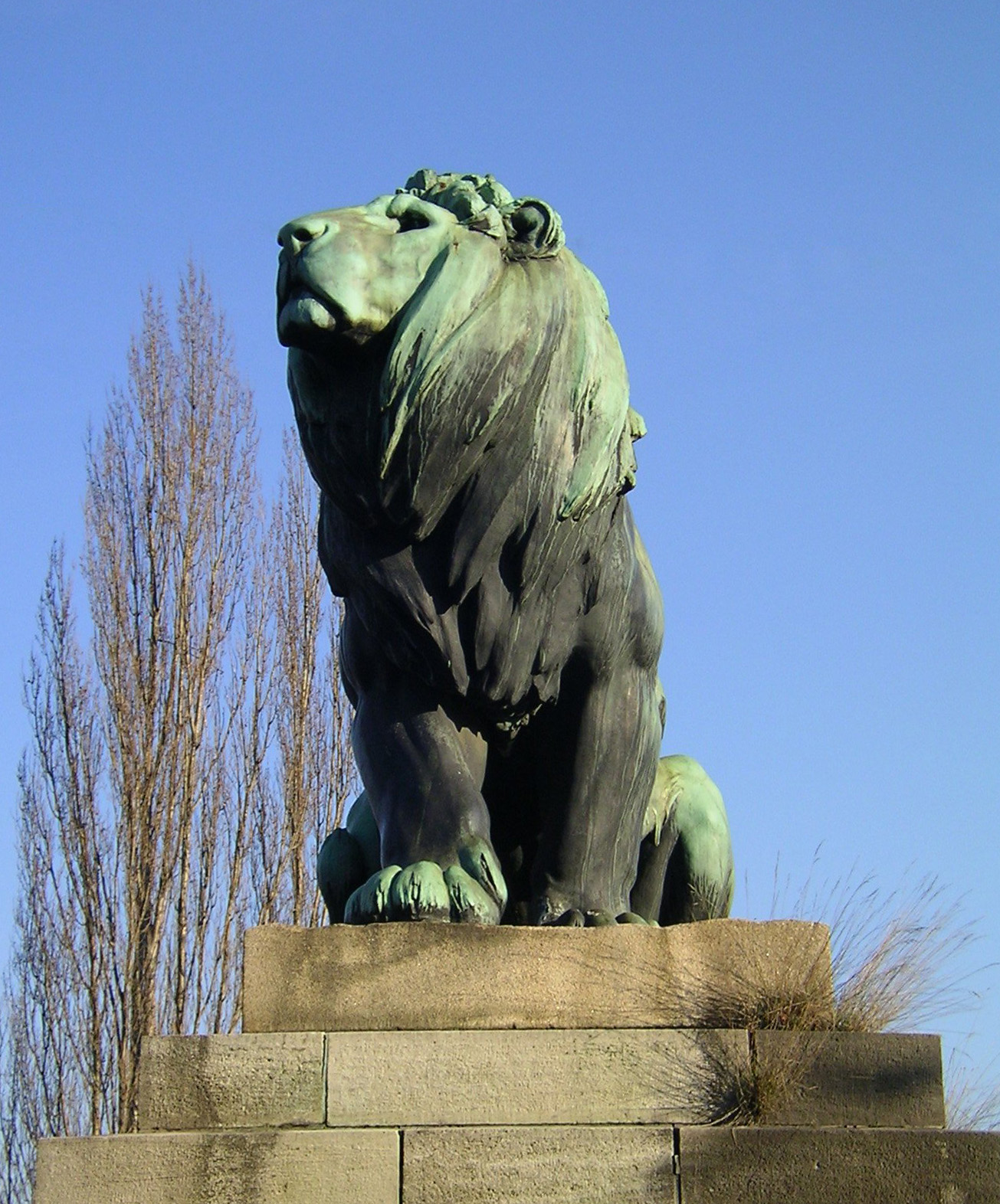 Löwenstatue an der Auffahrt zur Ludwigsbrücke (Löwenbrücke) in Würzburg.